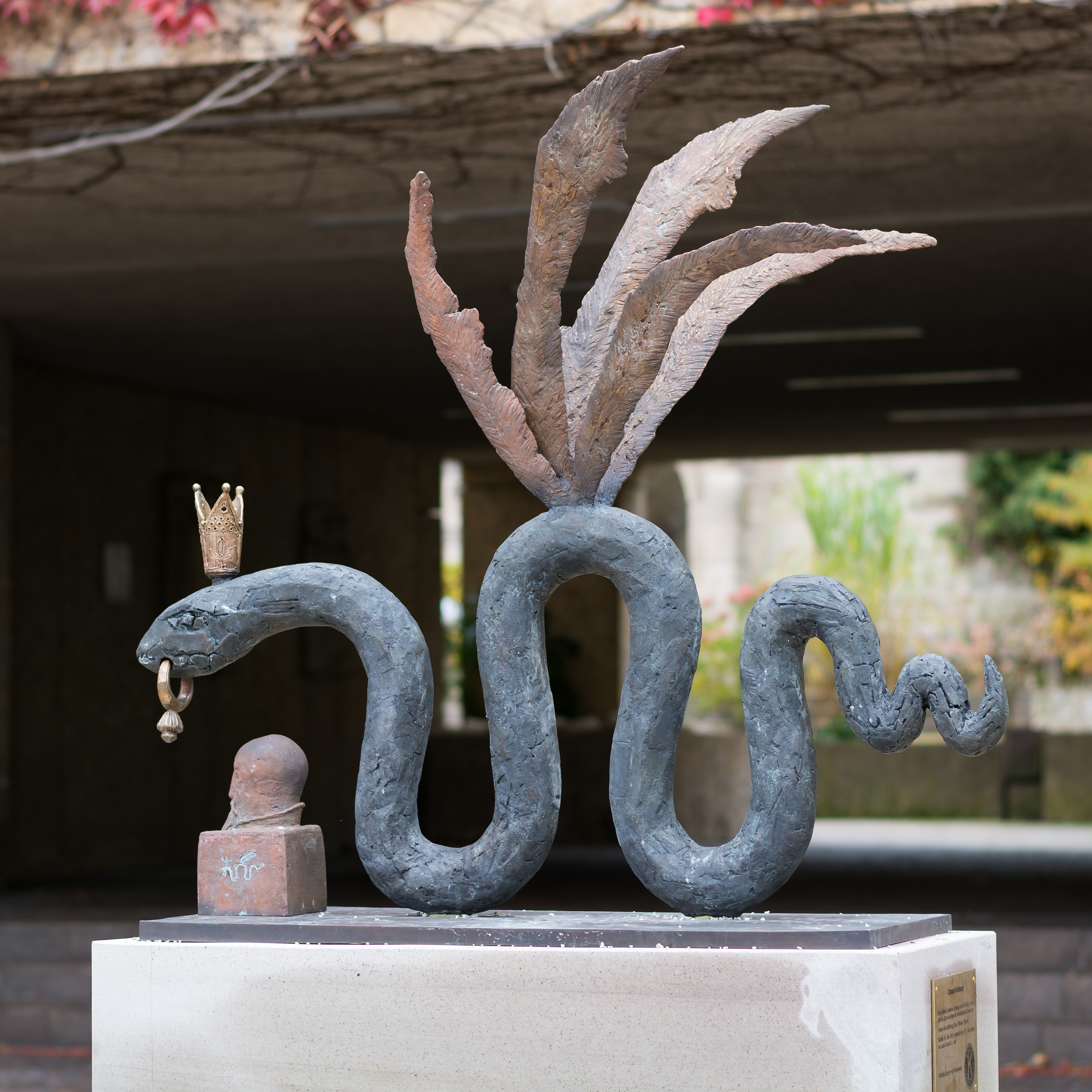 Bronzeskulptur der Cranach-Schlange, Wappen und Signet der Künsterfamilie Cranach, vor dem Neuen Rathaus in Kronach. Die von Claus Tittmann geschaffene Skulptur zeigt das Wappentier der Cranachs in der Form, in der es von Lucas Cranach dem Jüngeren verwendet wurde. Die Plastik wurde der Stadt Kronach vom Kiwanis Club Kronach anlässlich des 500. Geburtstags von Lucas Cranach d. J. im Jahr 2015 geschenkt.